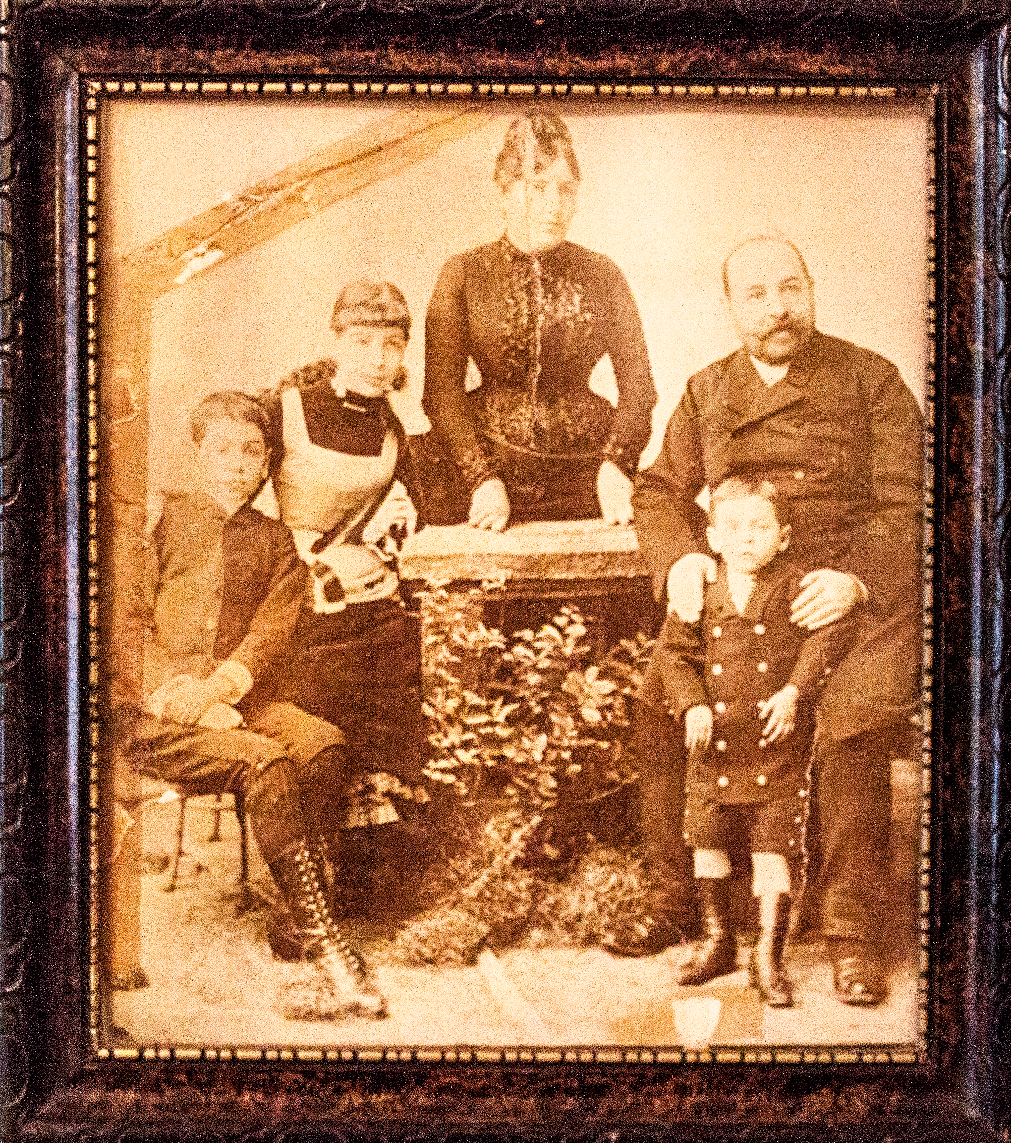 Imre_Kálmán_as_a_child,_at_right,_with_his_familylabel QS:Len,"Imre_Kálmán_as_a_child,_at_right,_with_his_family" label QS:Lhu,"Kálmán Imre gyermekként (jobbra lent) családja körében"